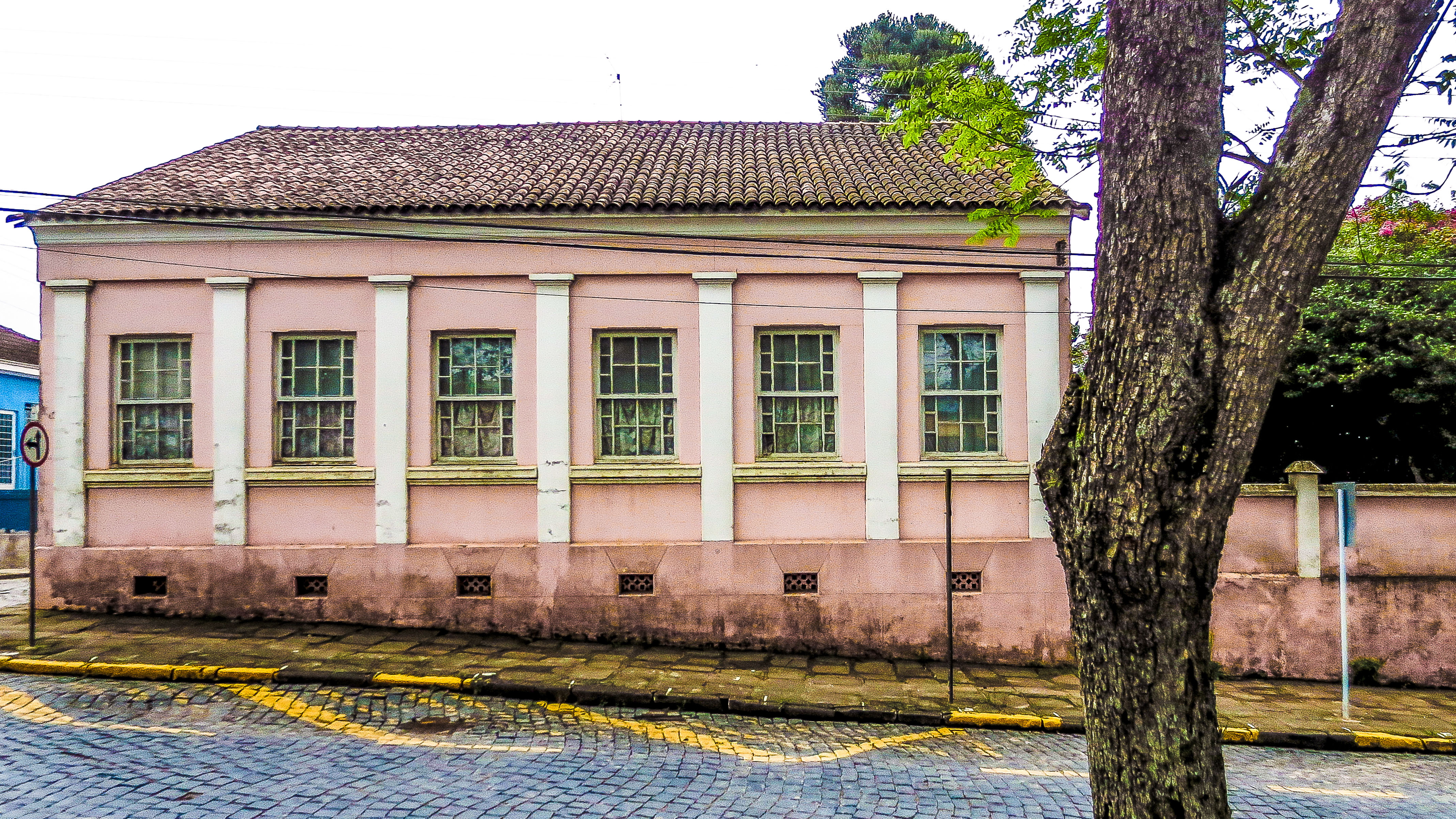 Lapa, PR: conjunto arquitetônico e paisagístico